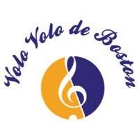 Kreyòl ayisyen : Tete lyon an